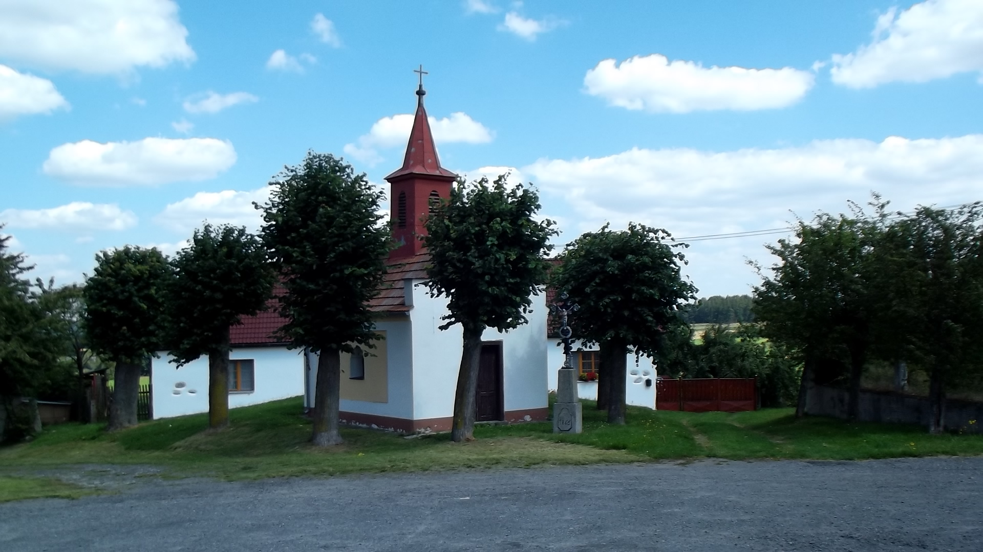 Kostelík, spíše kaplička, v Černicích.